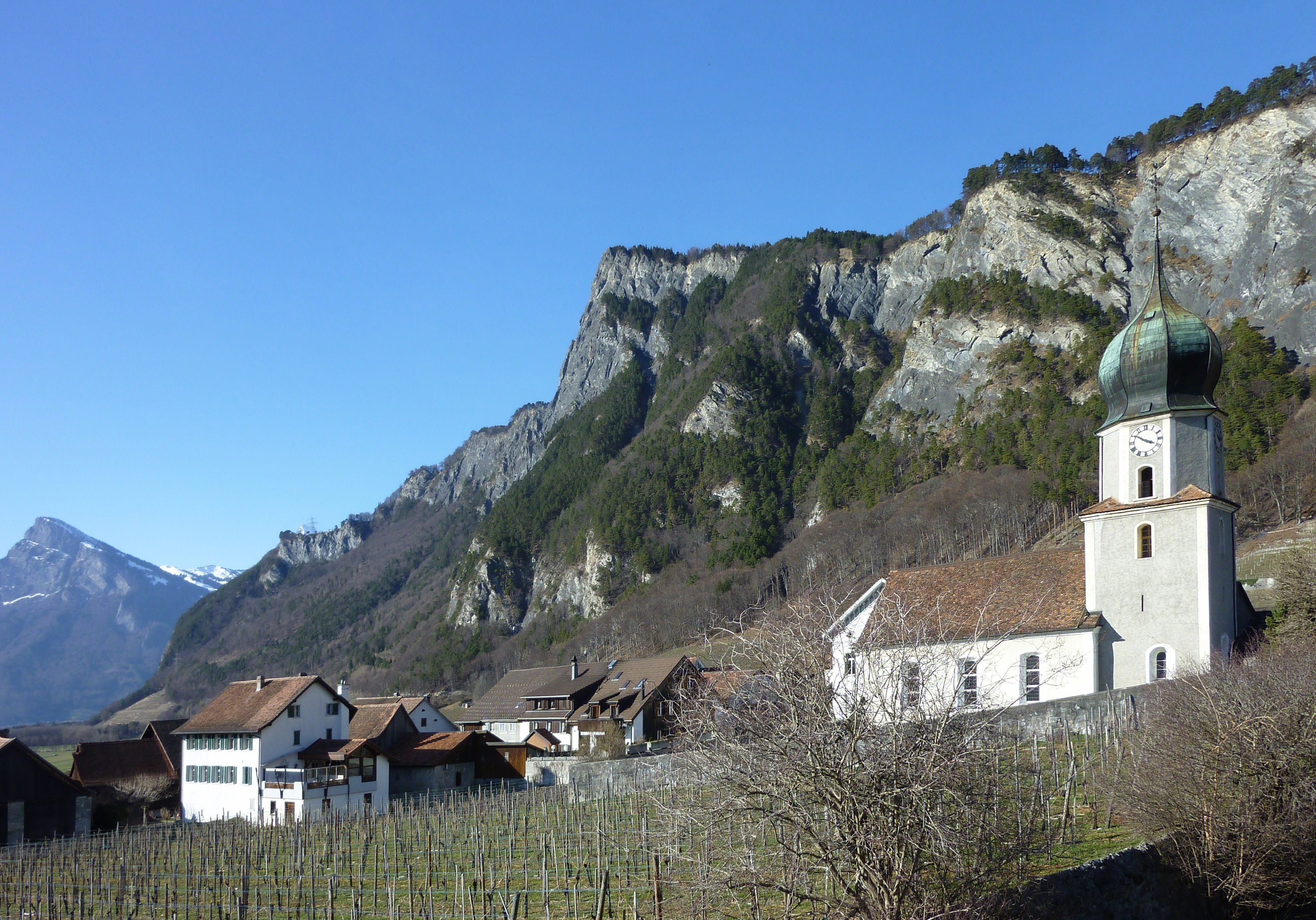 reformierte Kirche von Fläsch